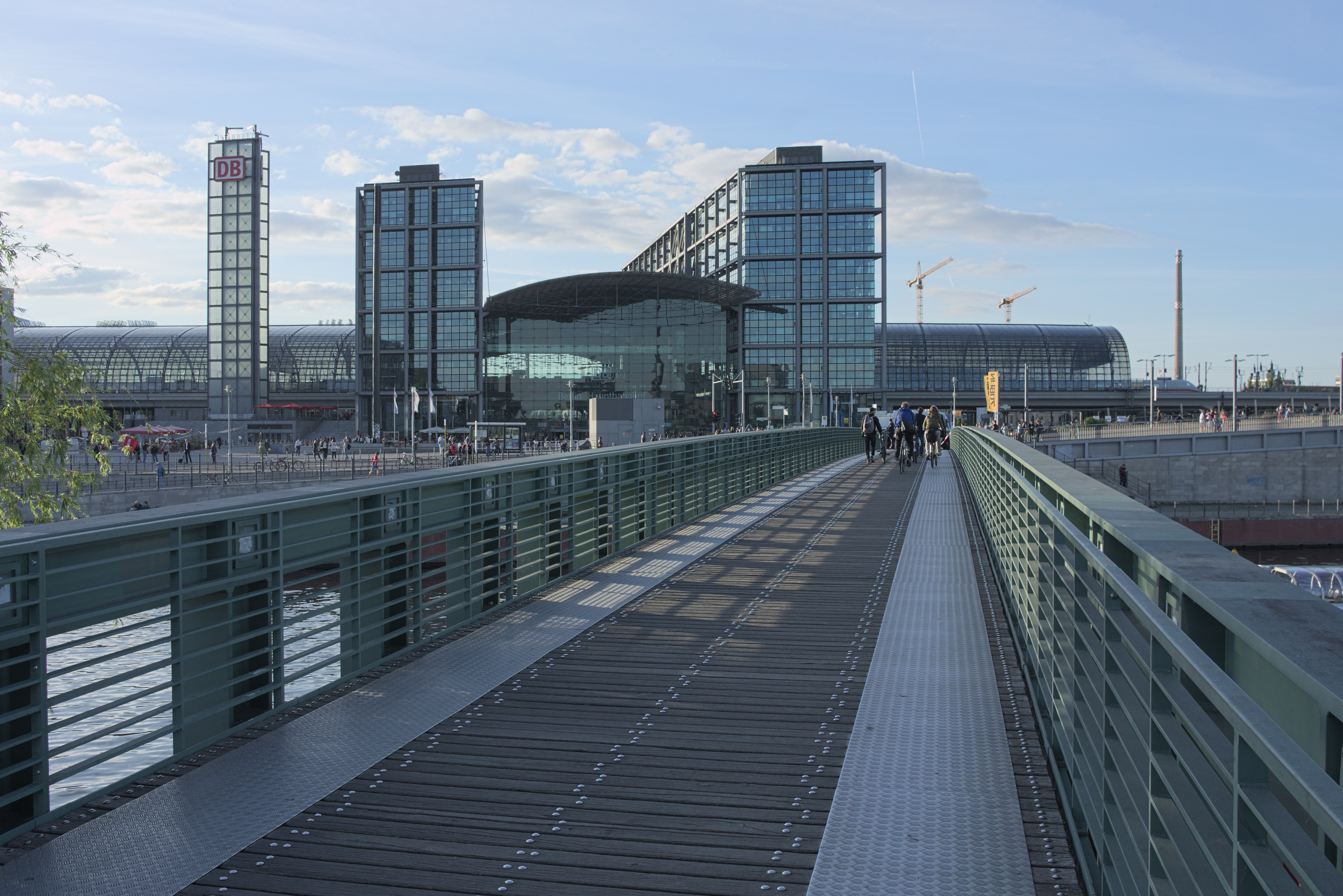 Berlin, Hauptbahnhof, Gustav-Heinemann-Brücke